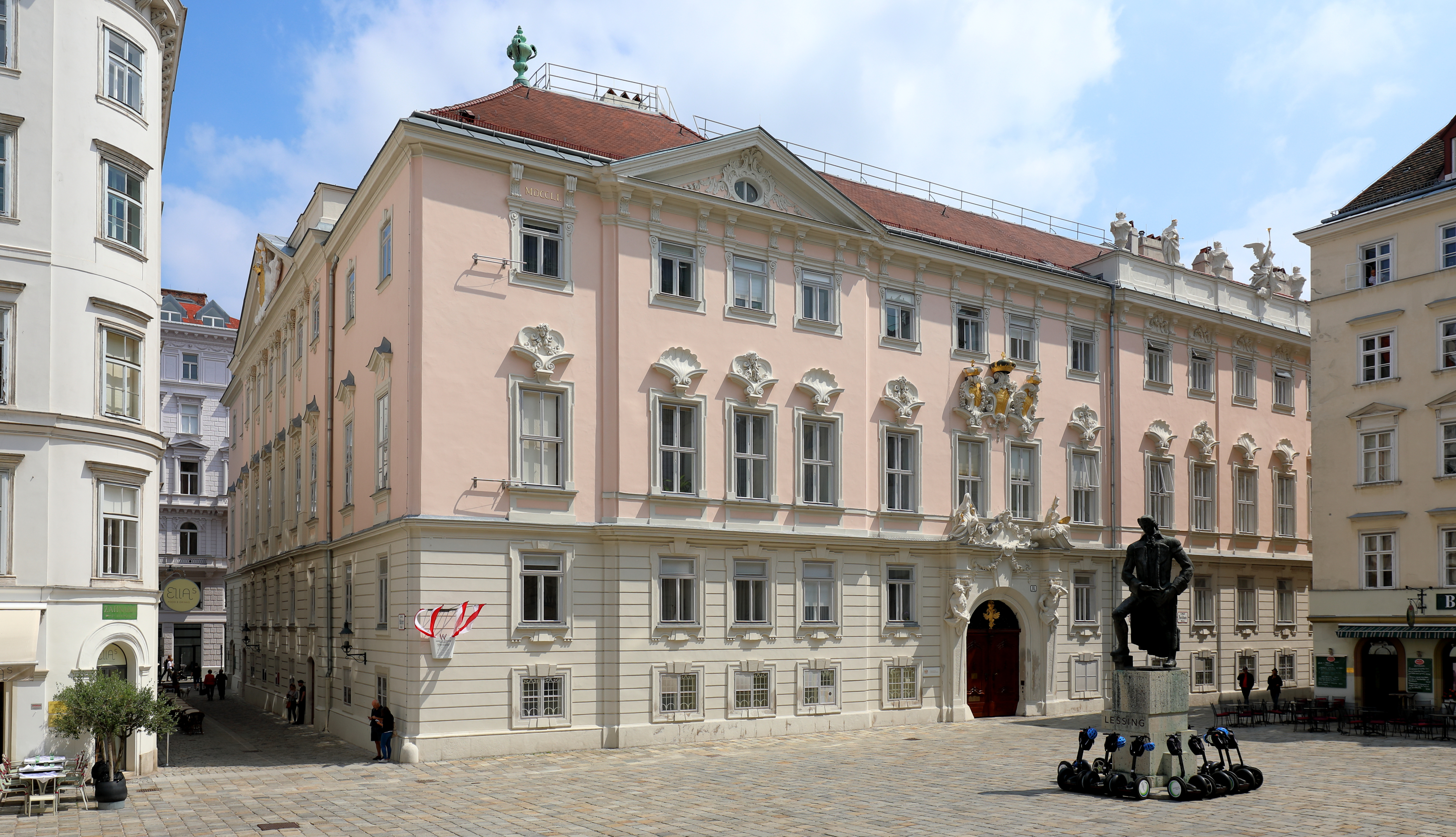 Die Südwestecke der ehemaligen Böhmischen Hofkanzlei im 1. Wiener Gemeindebezirk Innere Stadt und davor das Lessing-Denkmal.Das Gebäude zwischen dem Judenplatz und der Wipplinger Straße wurde von 1708/09 bis 1714 nach einem Entwurf von Johann Bernhard Fischer von Erlach erbaut und von 1751 bis 1754 von Mathias Gerl erweitert. Aktuell (2018) beherbergt es den Verwaltungsgerichtshof.